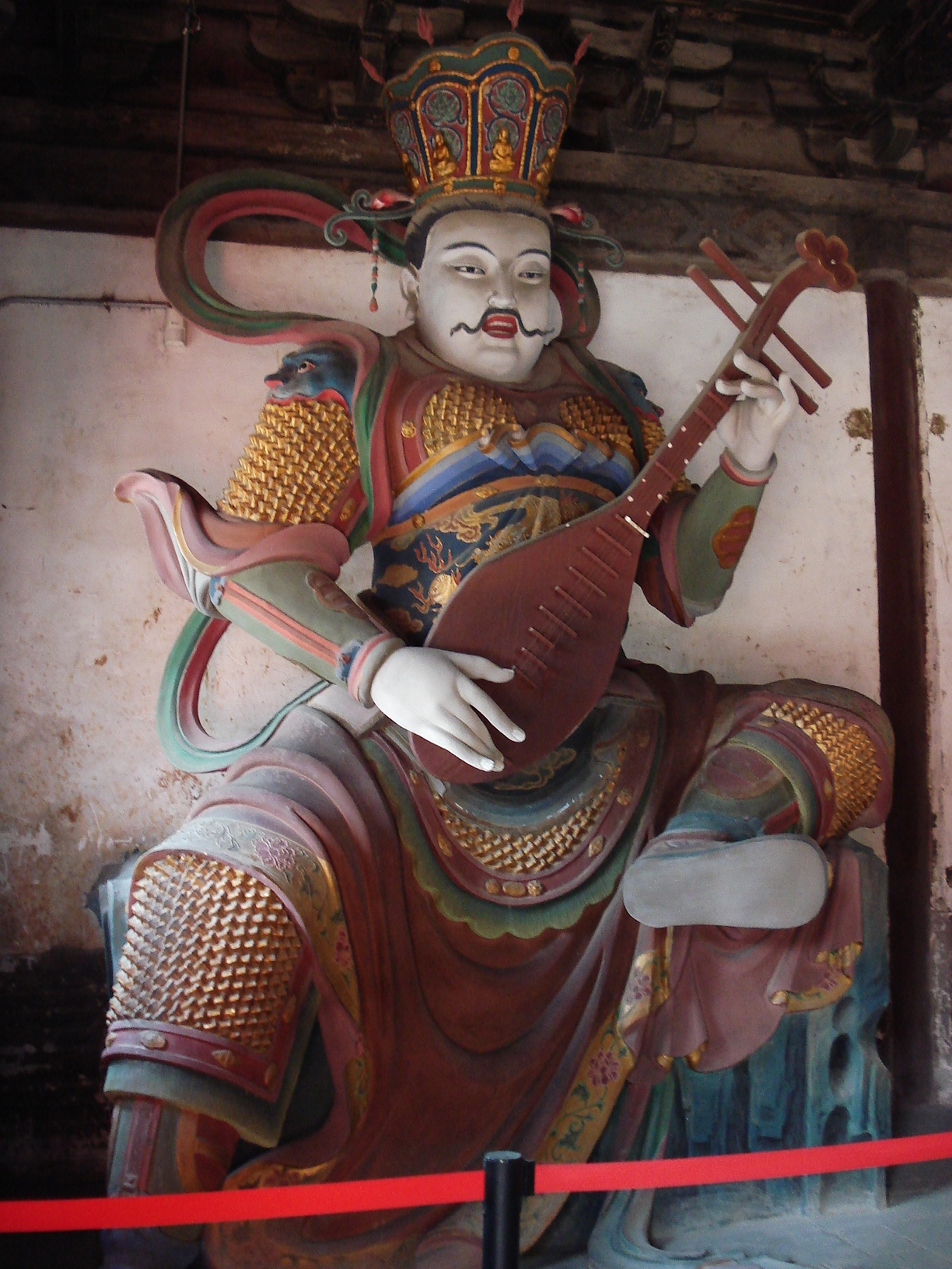 北京大觉寺持国天。